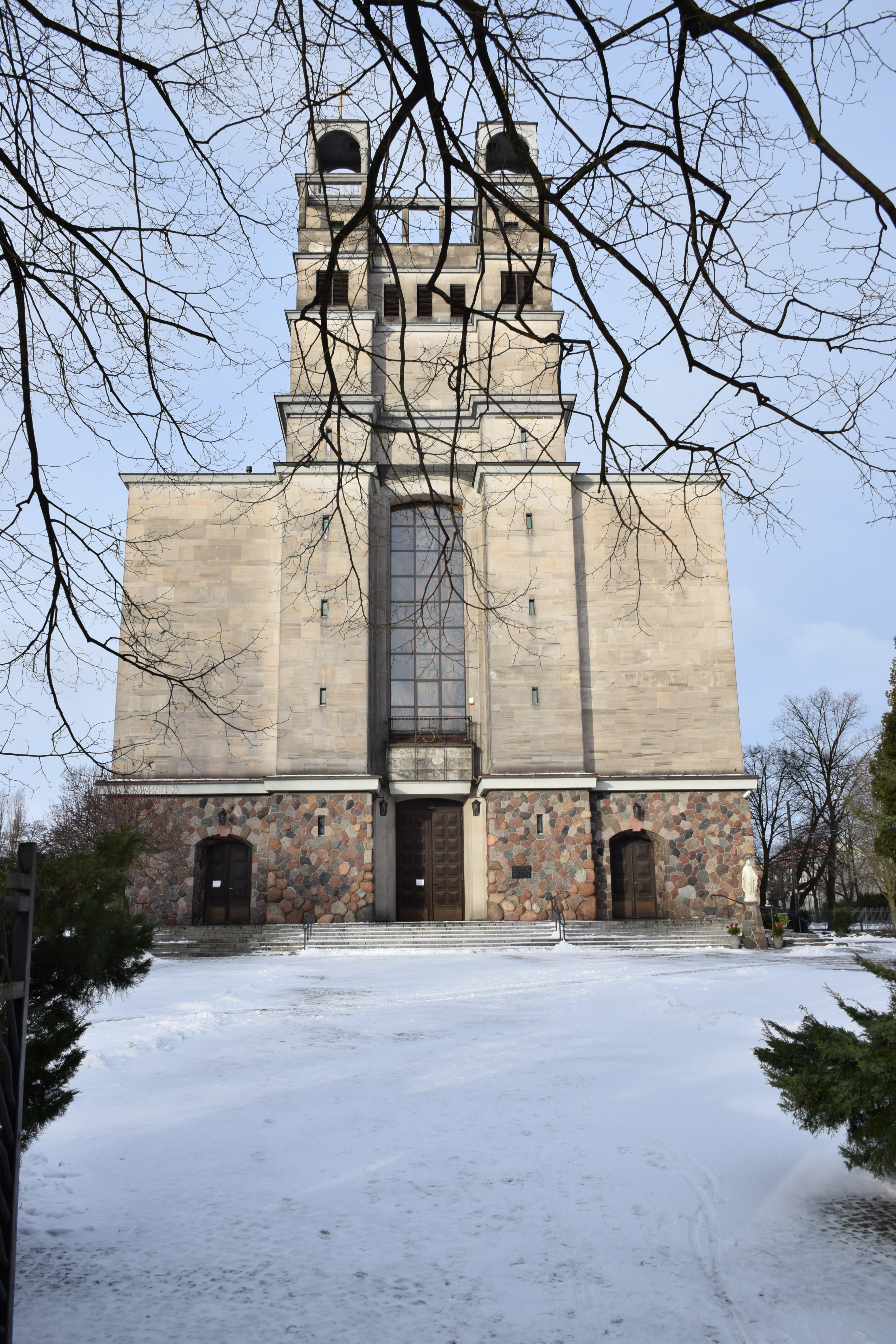 Wejście do kościoła od strony ul. Rybnickiej